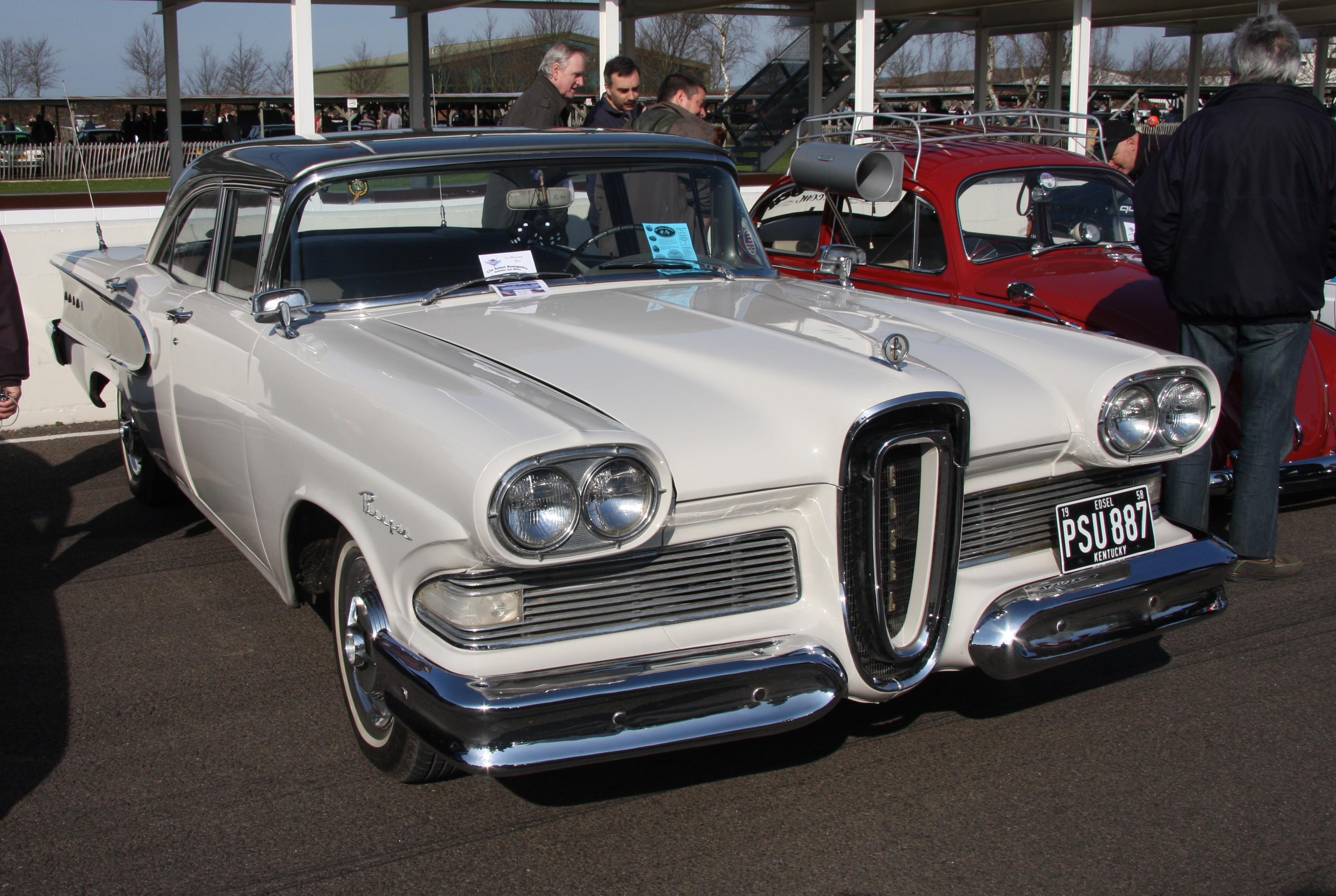 1958 Edsel Ranger 4-Door Sedan